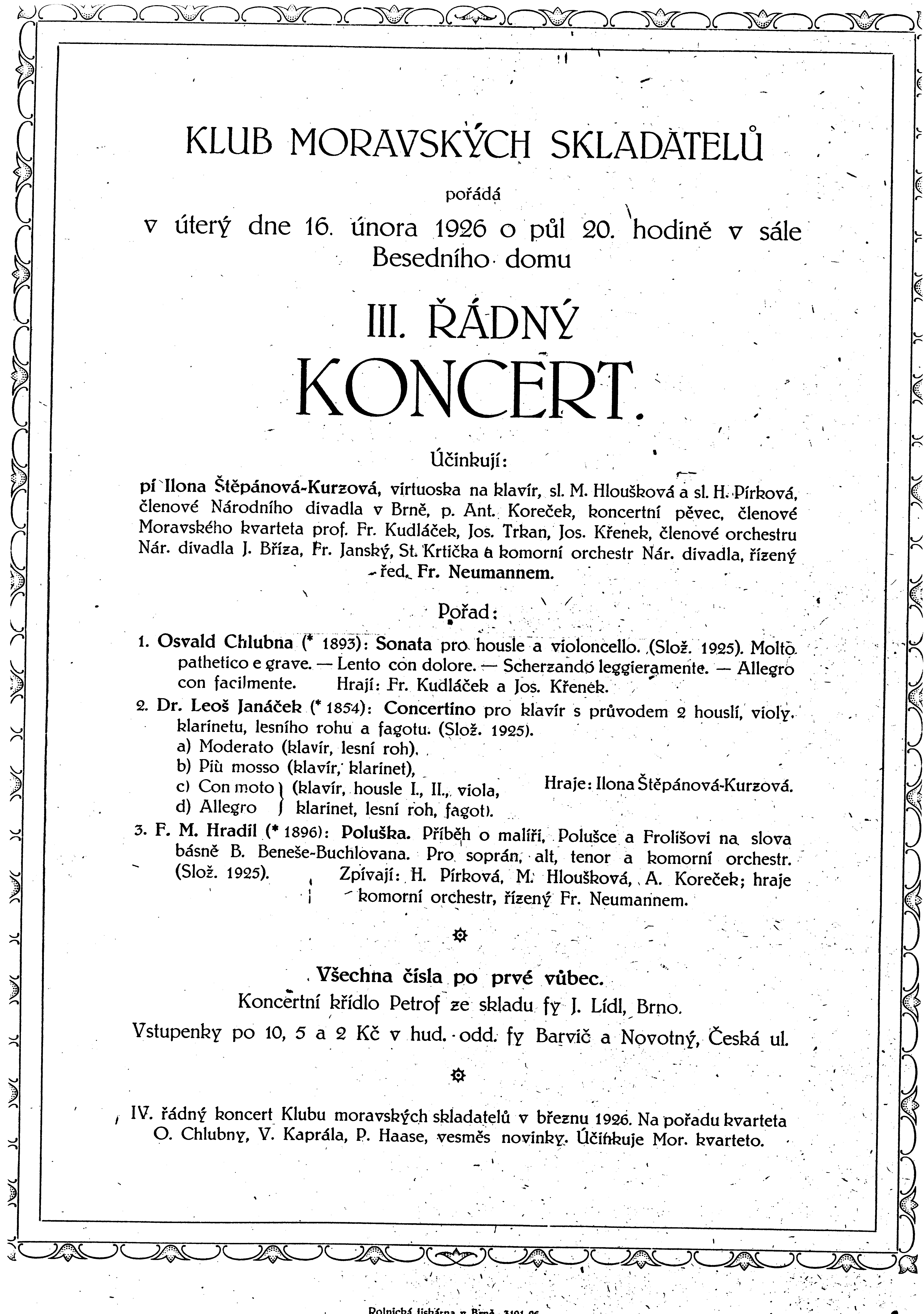 Ilona Štěpánová